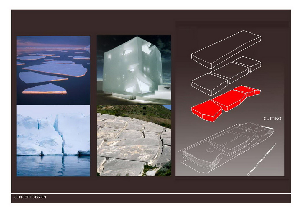 Arhitektura Portanova